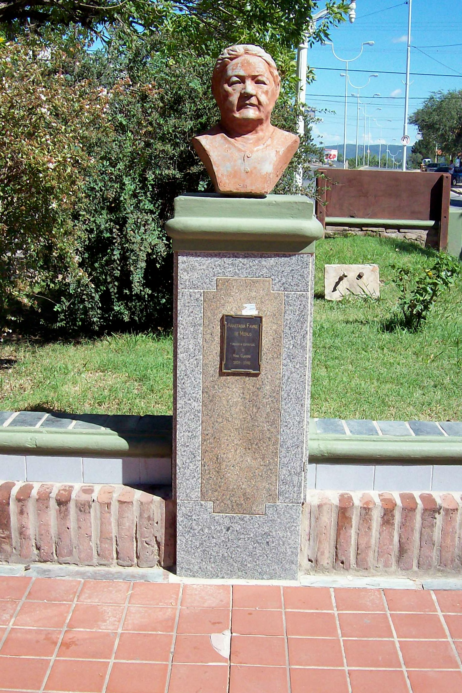 Busto de Anastasia Favre de Merlo, en la plazoleta intersección de la Av San Martín y la Av. Mitre, en Mina Clavero, provincia de Córdoba, Argentina.